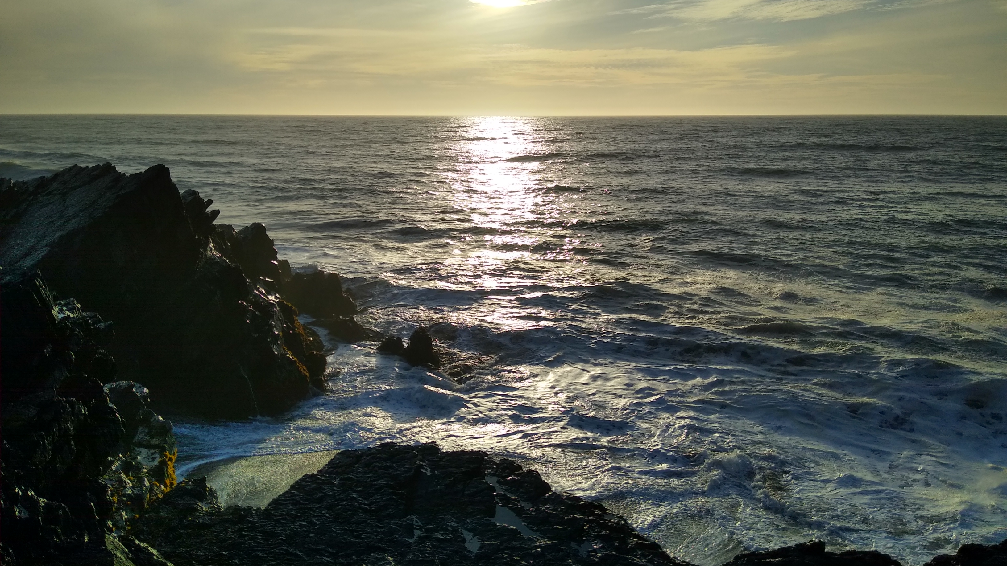 Ruptura tectonica en Mela